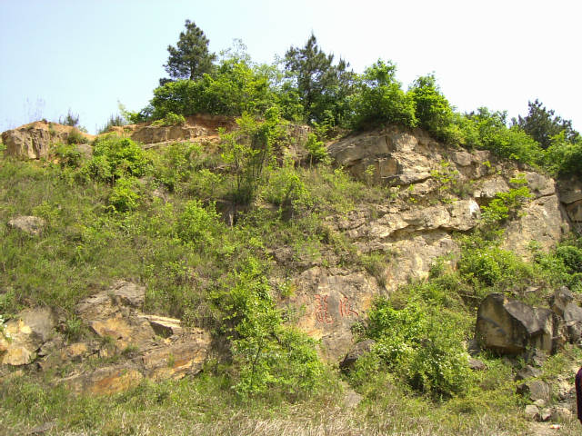 将軍山 臥龍崖 2004年4月24日撮影 撮影者：権作